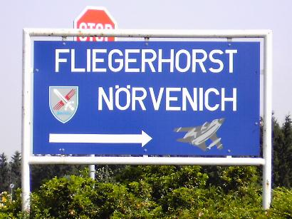 Das Einfahrtsschild zum Fliegerhorst Nörvenich, Eigenes Foto von papa1234 vom 30.06.06